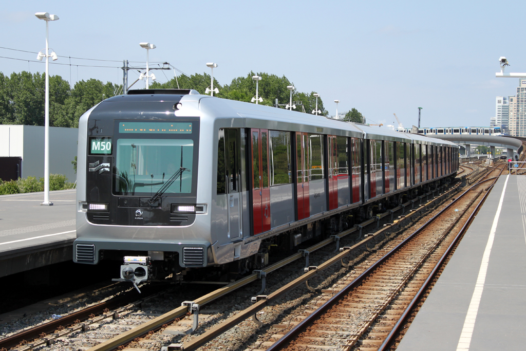 GVB Metropolis 109/110 tijdens instructieritten.